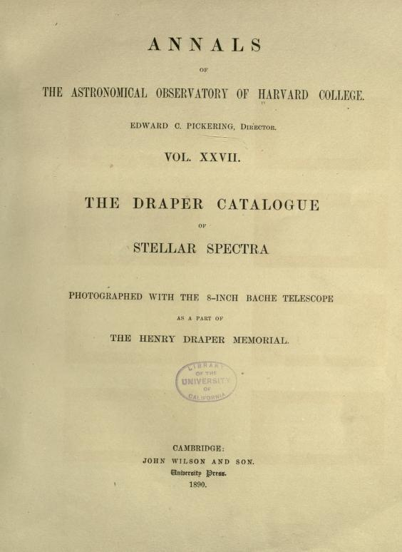 Portada del Catálogo Henry Draper